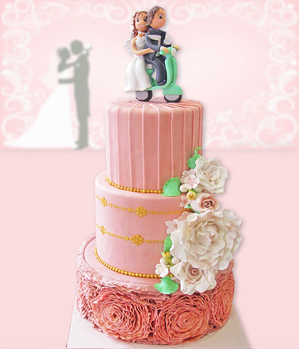 Tarta personalizada de Boda